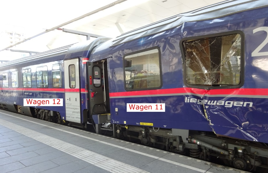 Bei der Kollision in Salzburg stark deformierter Wagen 11 der stehenden Wagengruppe.